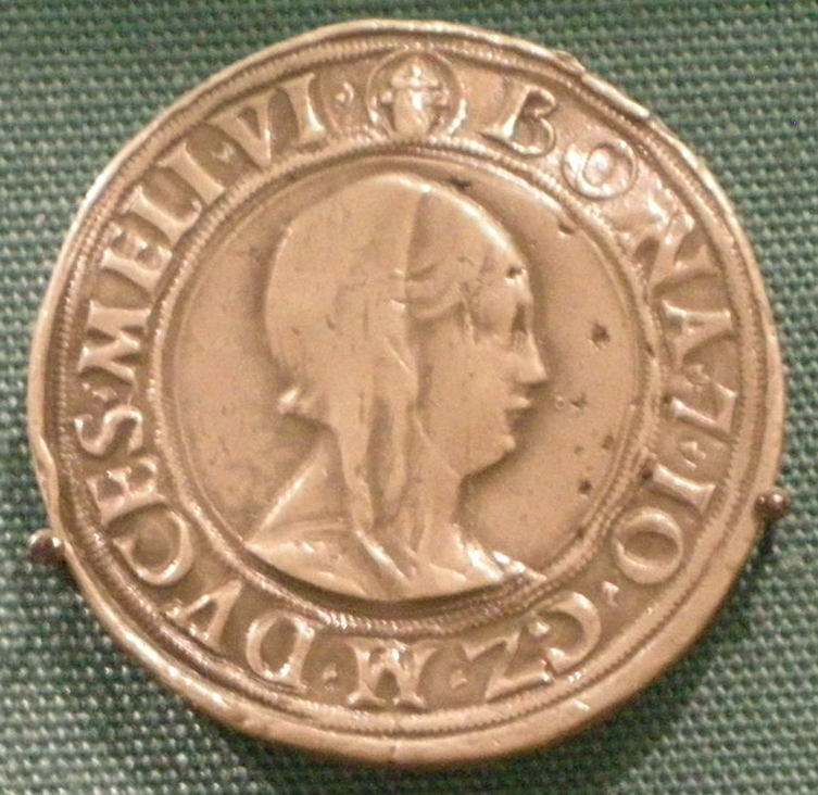 Testone d'argento pesante con bona di savoia, reggente di milano (1476-80)